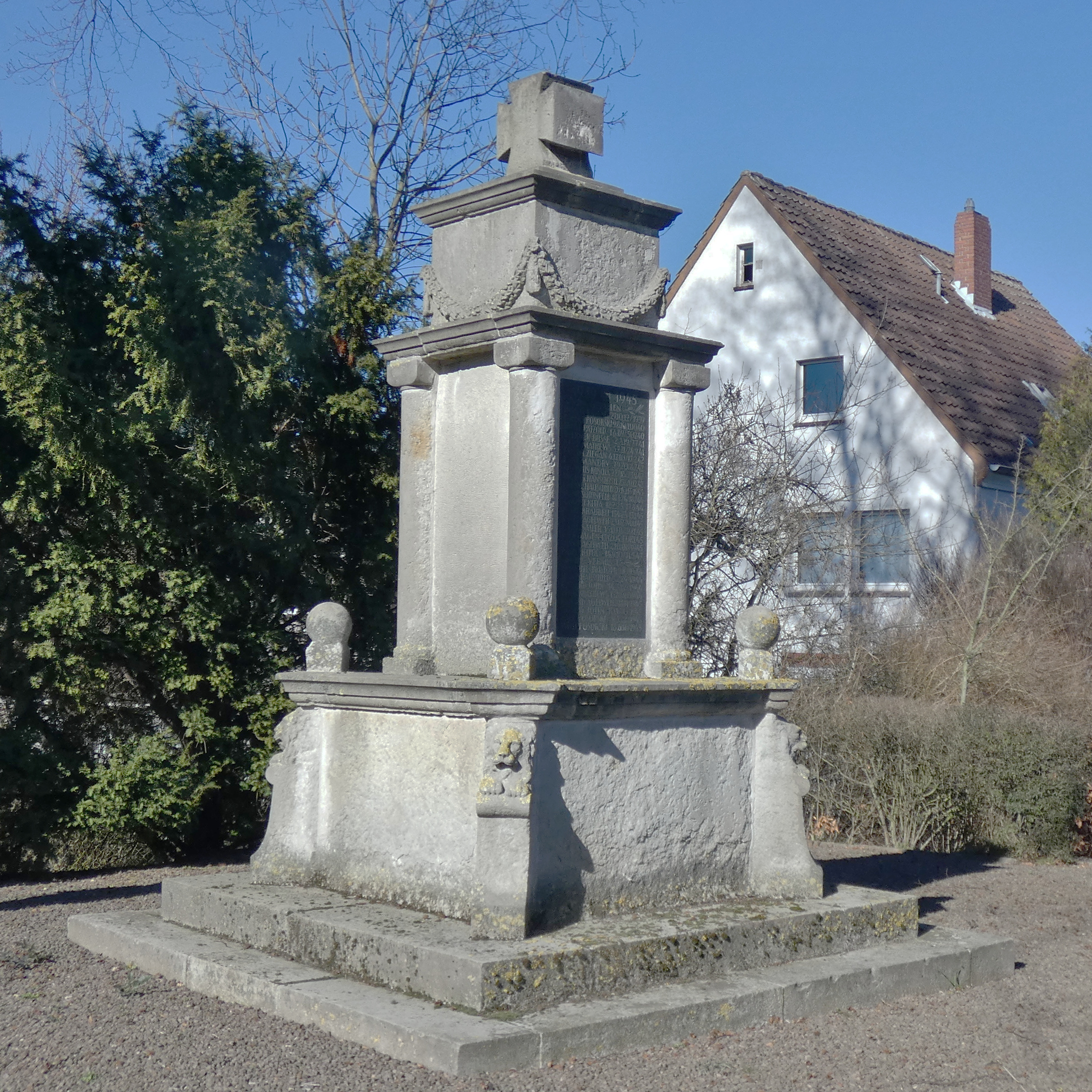 Ehrenmal für Northens Weltkriegsgefallene.